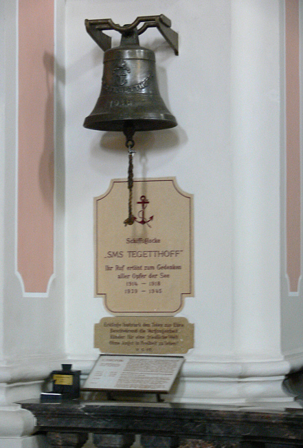 Barmherzigenkirche Mariä Verkündigung (Garnisonskirche), Graz Schiffsglocke der SMS Tegetthoff